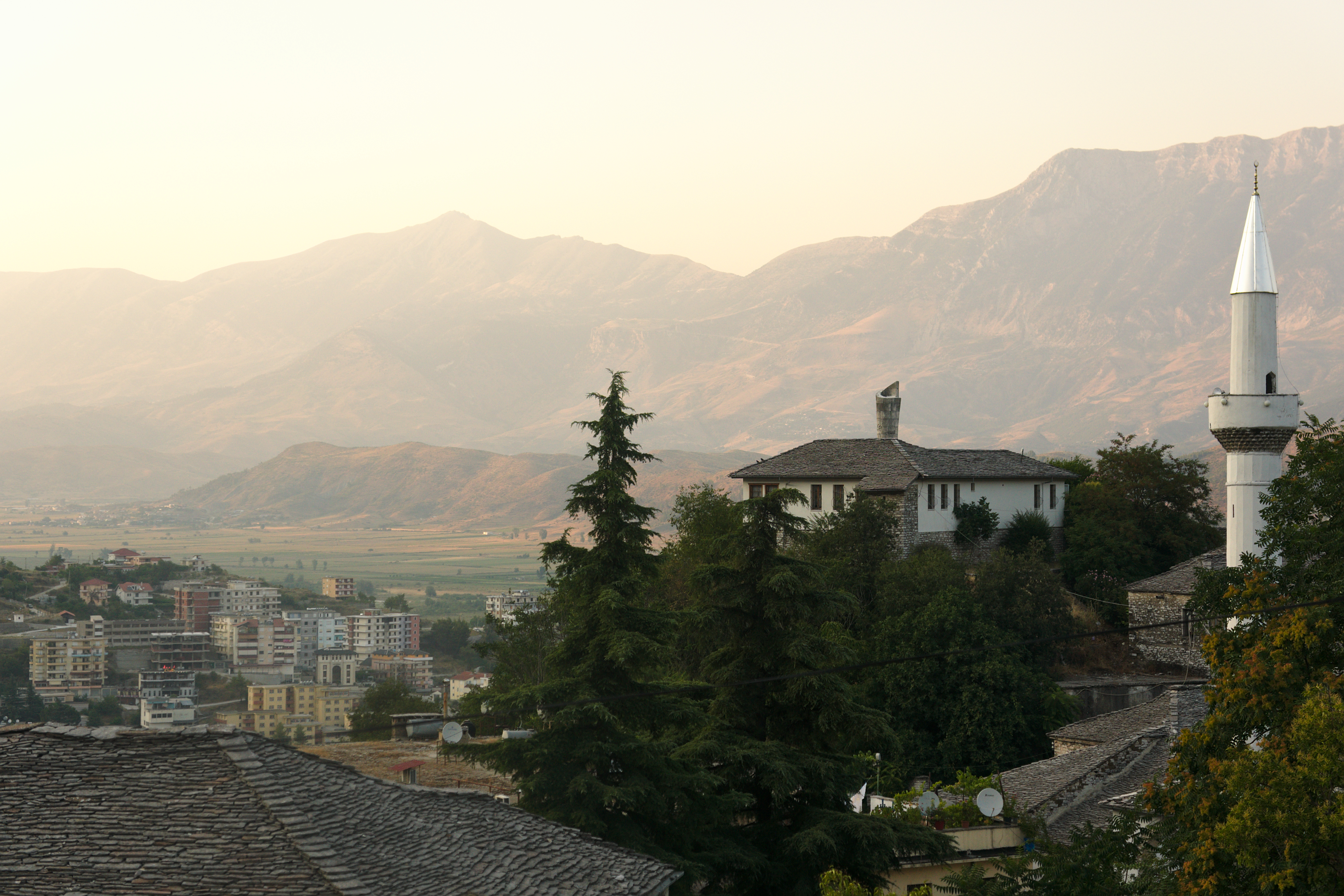 La ville de Gjirokastër et la mosquée mosquée de la vieille ville.